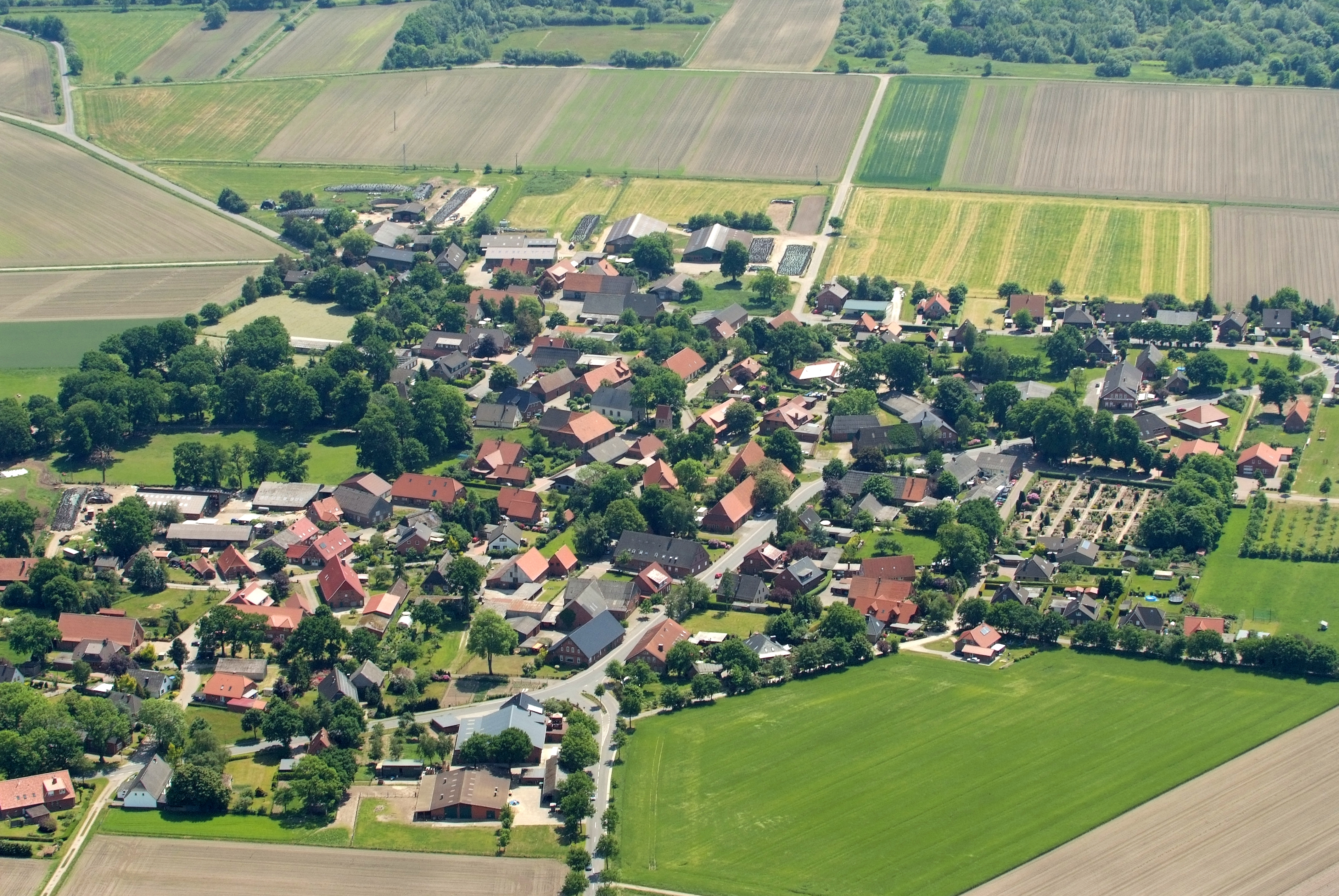 Ortschaft Bramel in der Einheitsgemeinde Schiffdorf Fotoflug vom Flugplatz Nordholz-Spieka über Cuxhaven und Wilhelmshaven